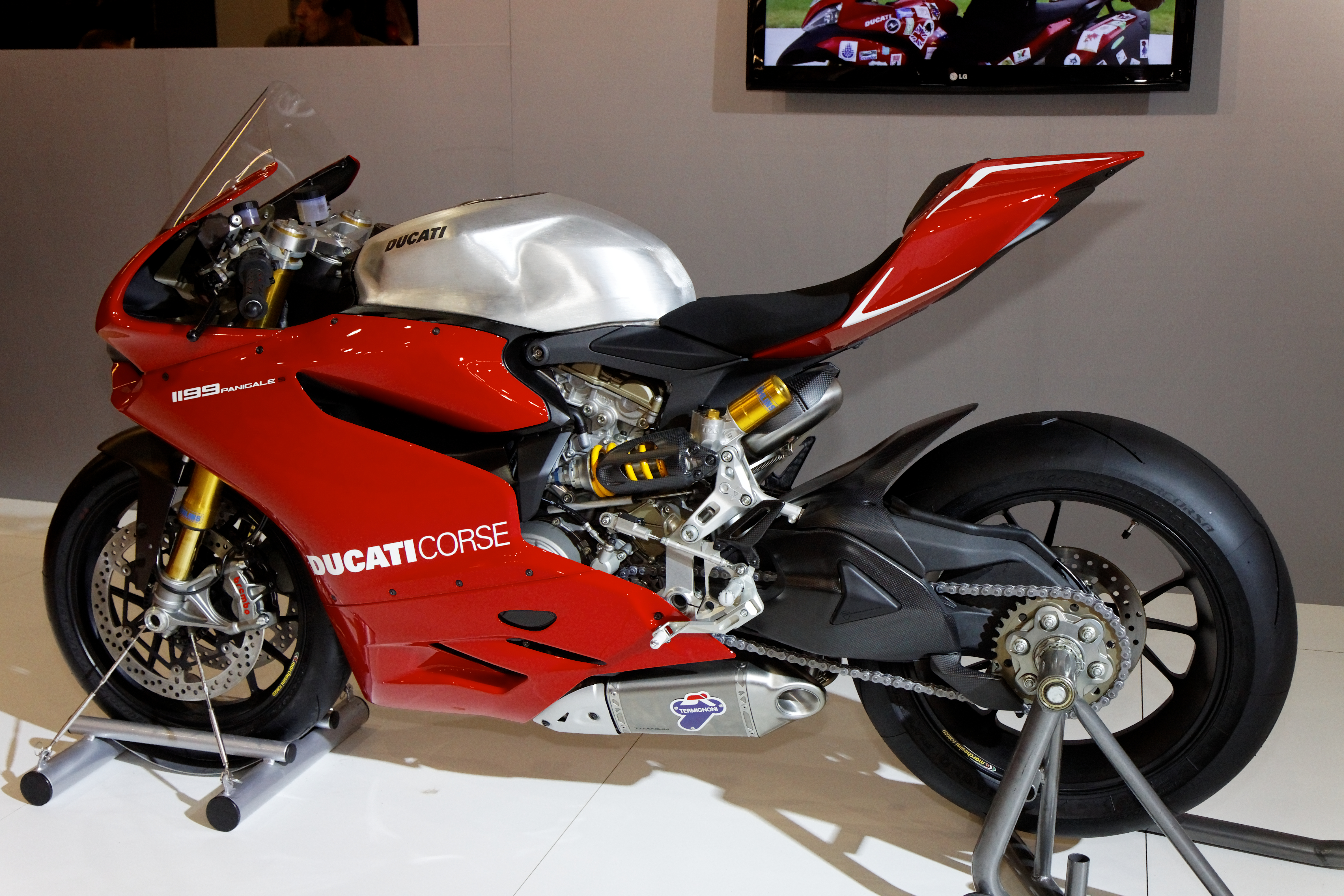 Ducati - 1199 Panigale S